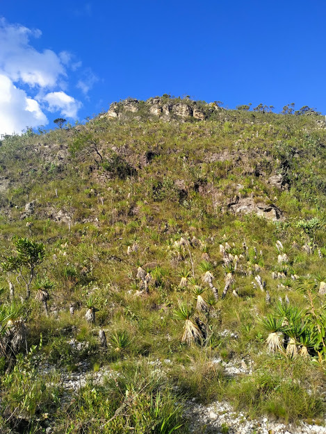 Complexo rupestre na Trilha dos Escravos, Serra do Cipó - MG.